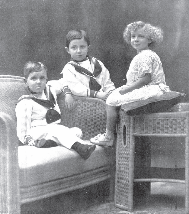 Retrato de los tres hijos mayores del rey Alfonso XIII de España realizado por Franzen en 1913. De izquierda a derecha se aprecia a Alfonso, príncipe de Asturias; al infante Jaime y a la infanta Beatriz.